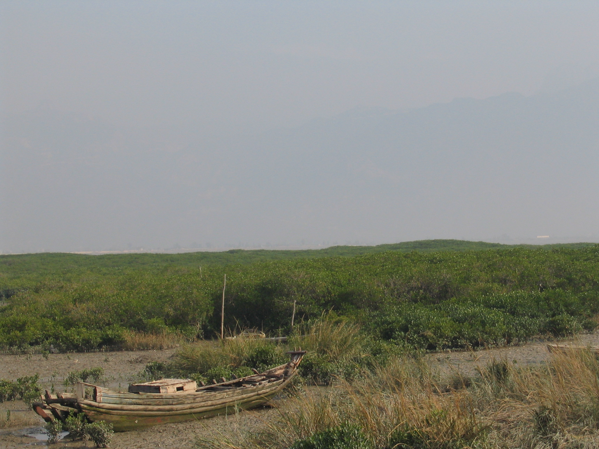 2004年摄于中国福建省云霄县东厦镇红树林